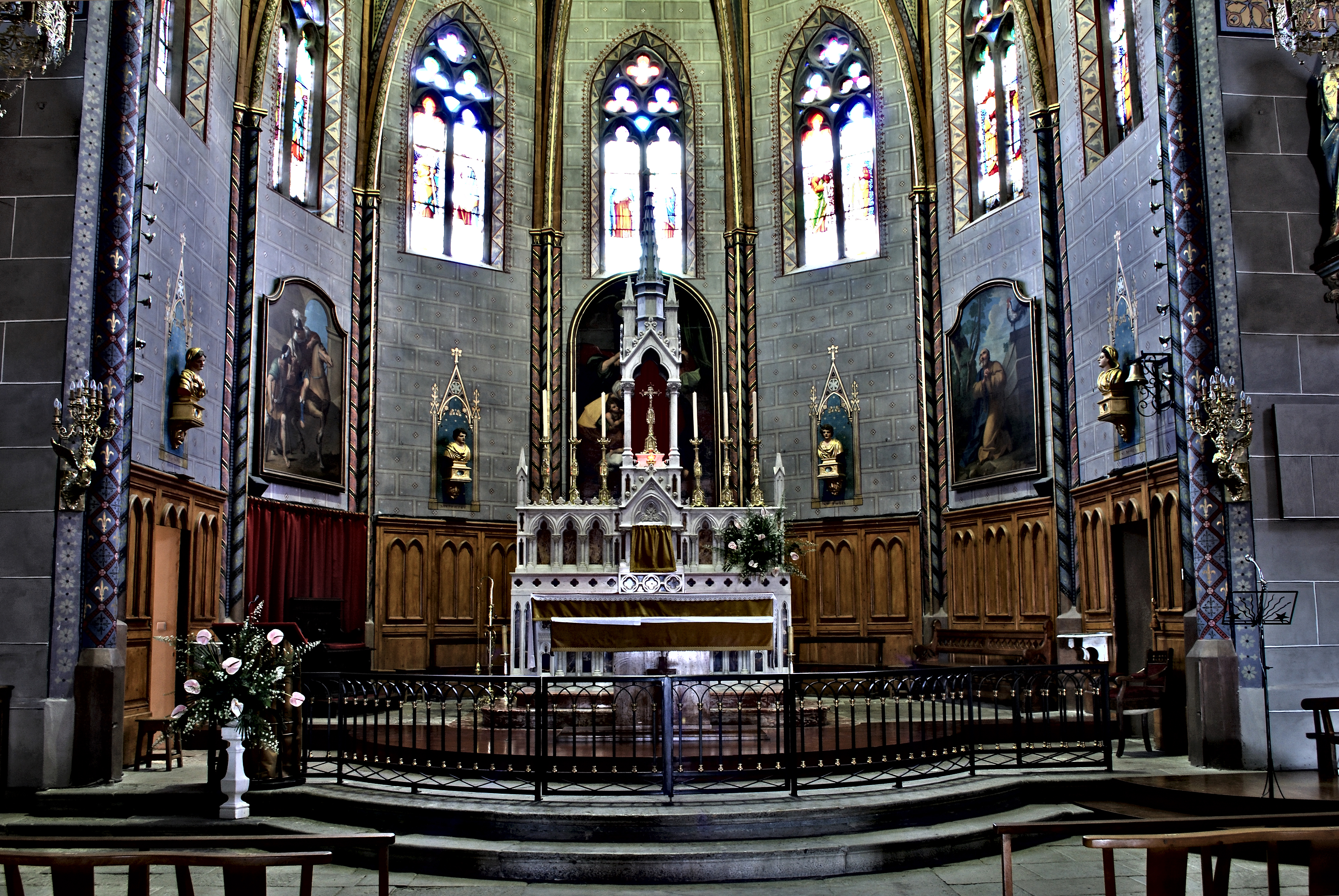 Laroque-d'Olmes, Ariège - Chœur de l'église du Saint-Sacrement